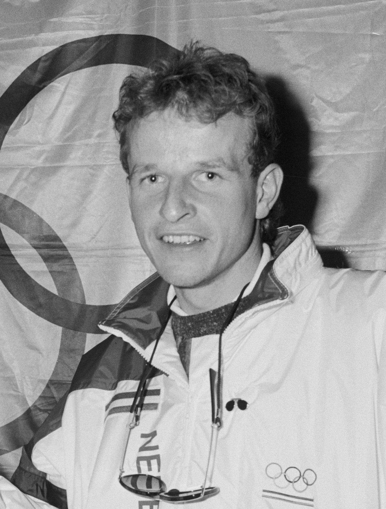 Leo Visser